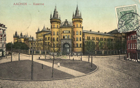 ehemalige Gelbe Kaserne Aachen, Zustand vor dem Ersten Weltkrieg